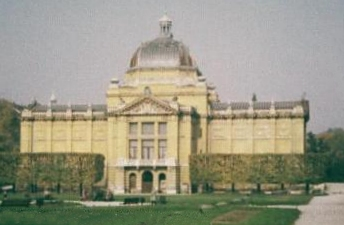 Zagreb